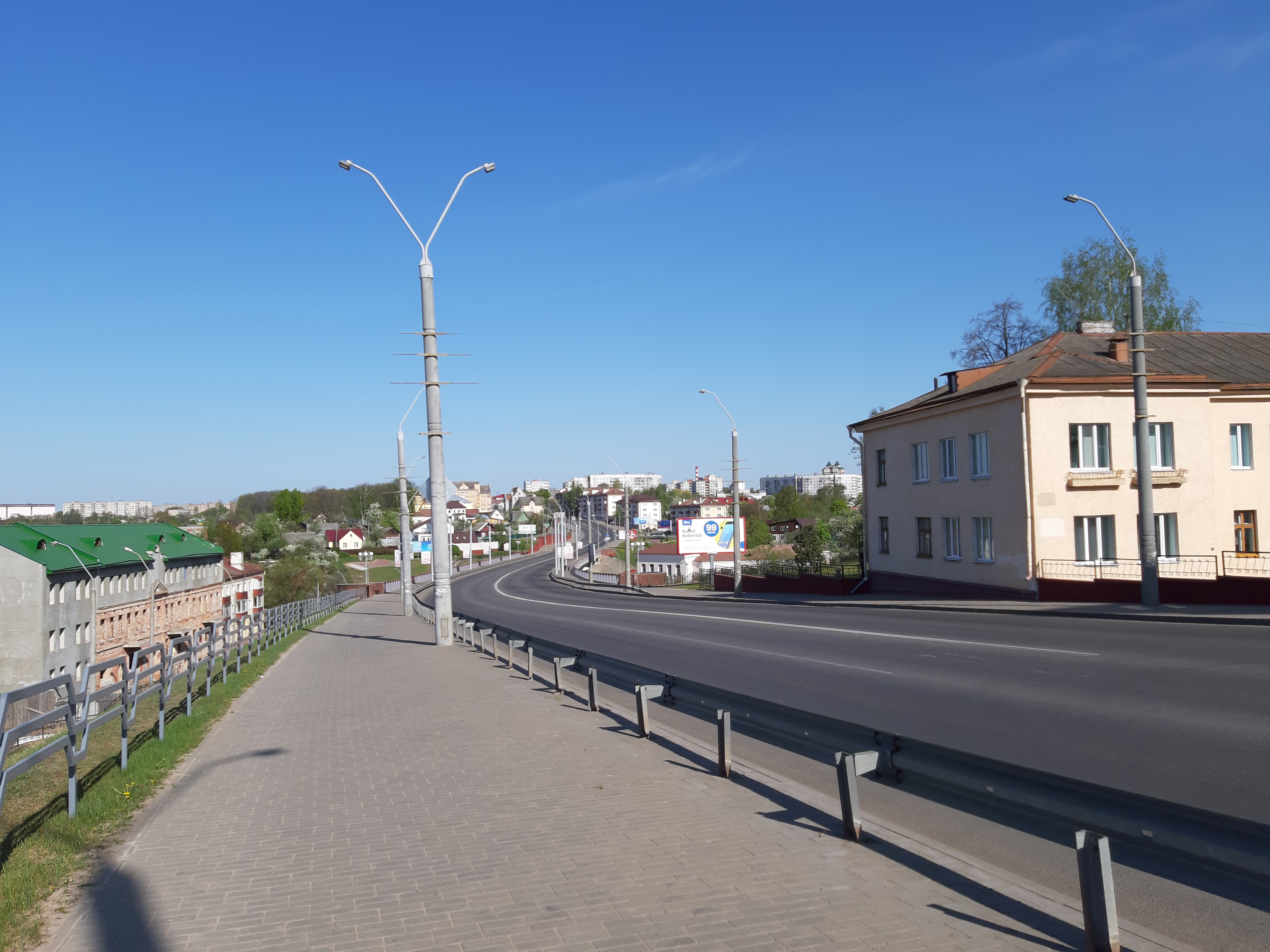 Магілёў. Па Лазарэнкі